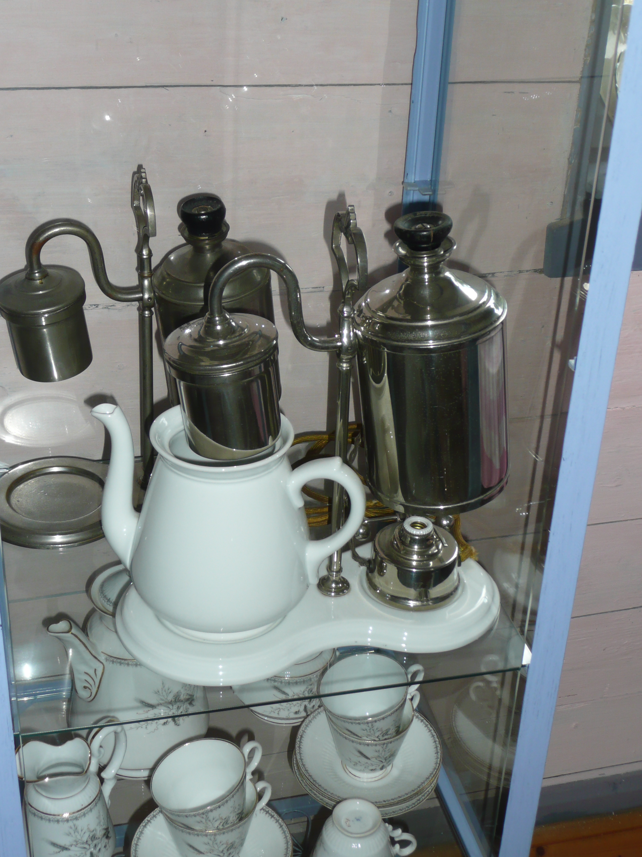 Perkolator mit Spiritusbeheizung im Kaffeemuseum Ebersbach/Sa. Oberer Kirchweg 26